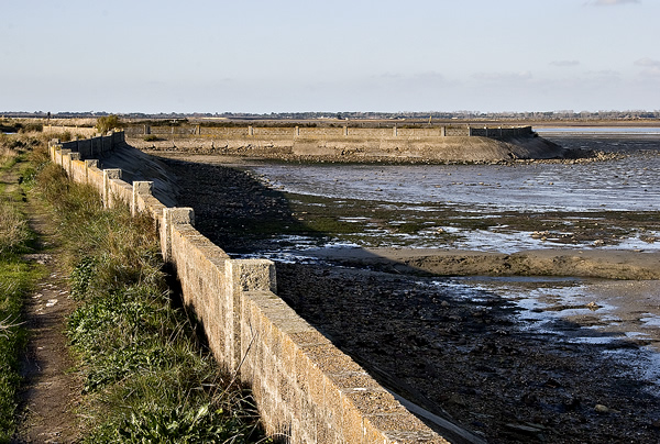 Digue bordant le fier d'Ars sur l'île de Ré - Charente-Maritime